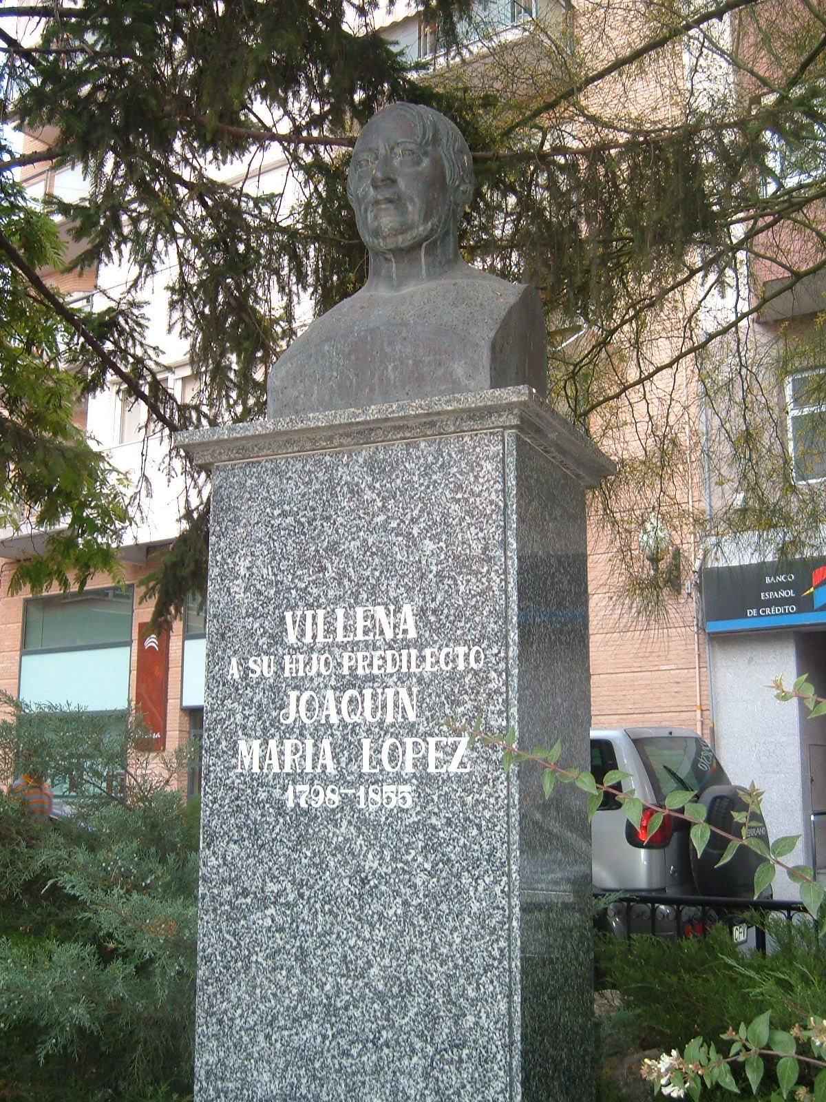 Busto del politico español Joaquín María López (1798-1855).